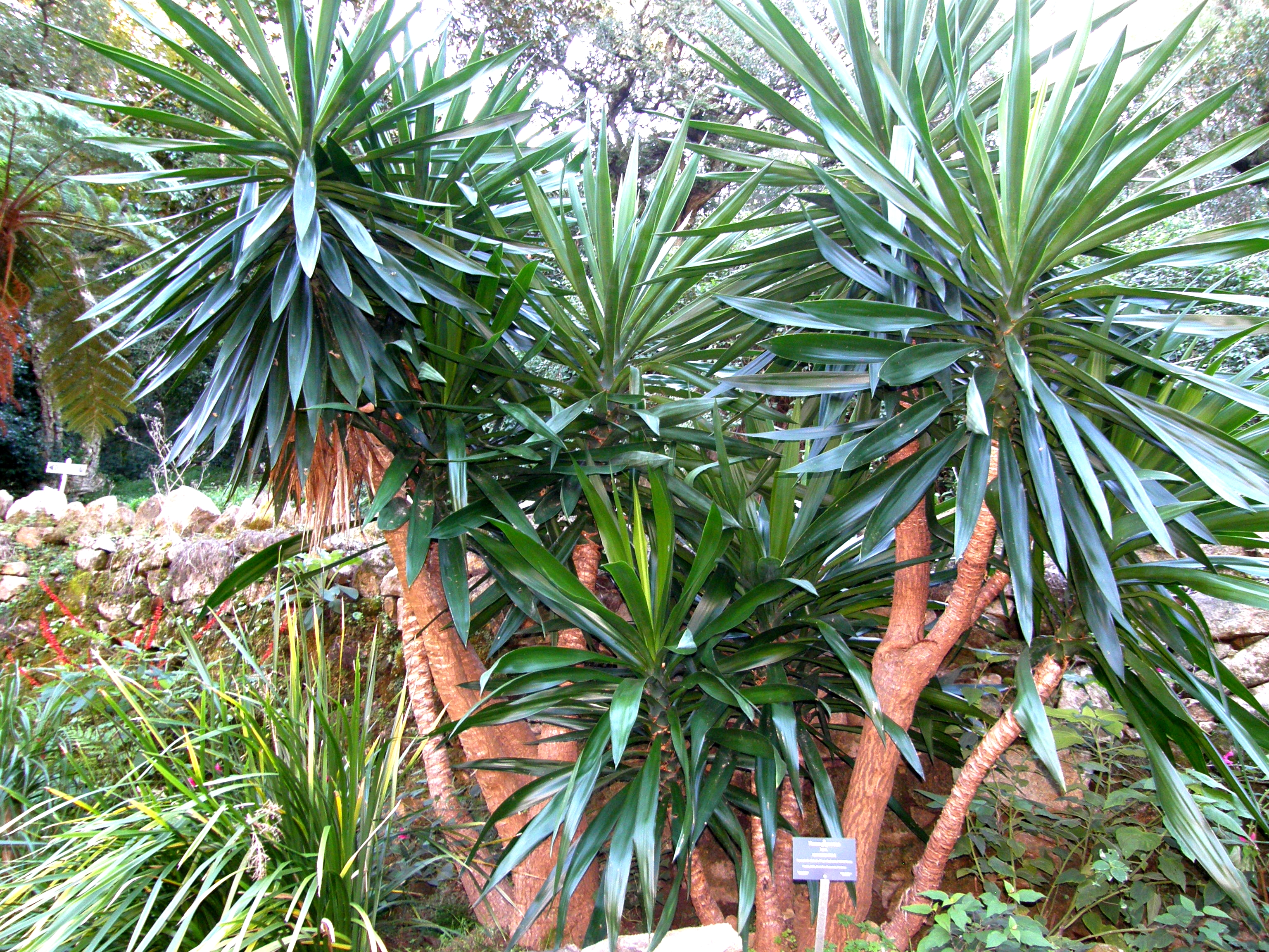 Yucca gigantica Lem. Parc de Monserrate, Sintra, Portugal. Parfois nommé Yucca elephnatipesReg.